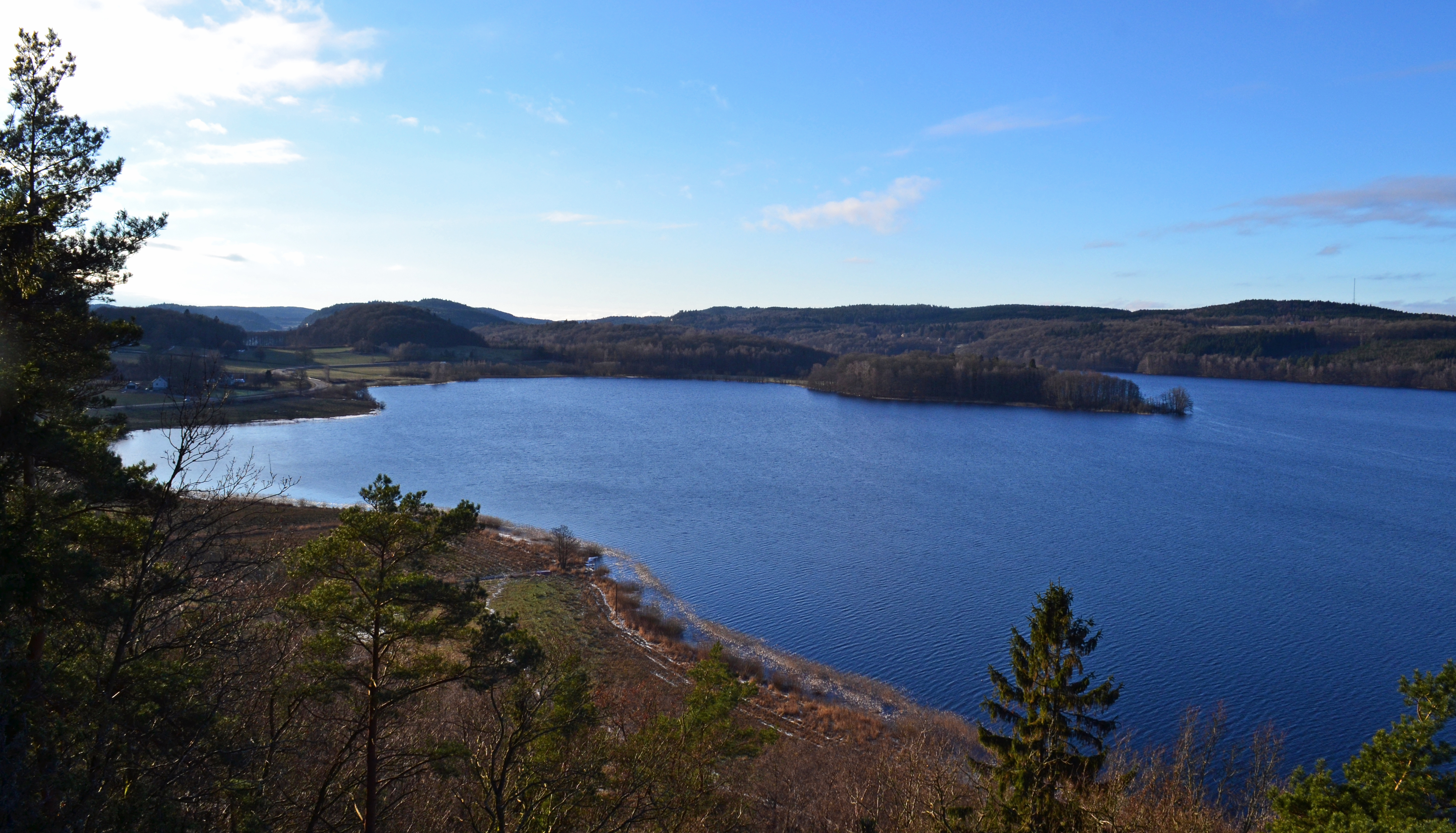 Vy över den sydliga delen av Fävren med Björnnäs udde, mot Grimmared.